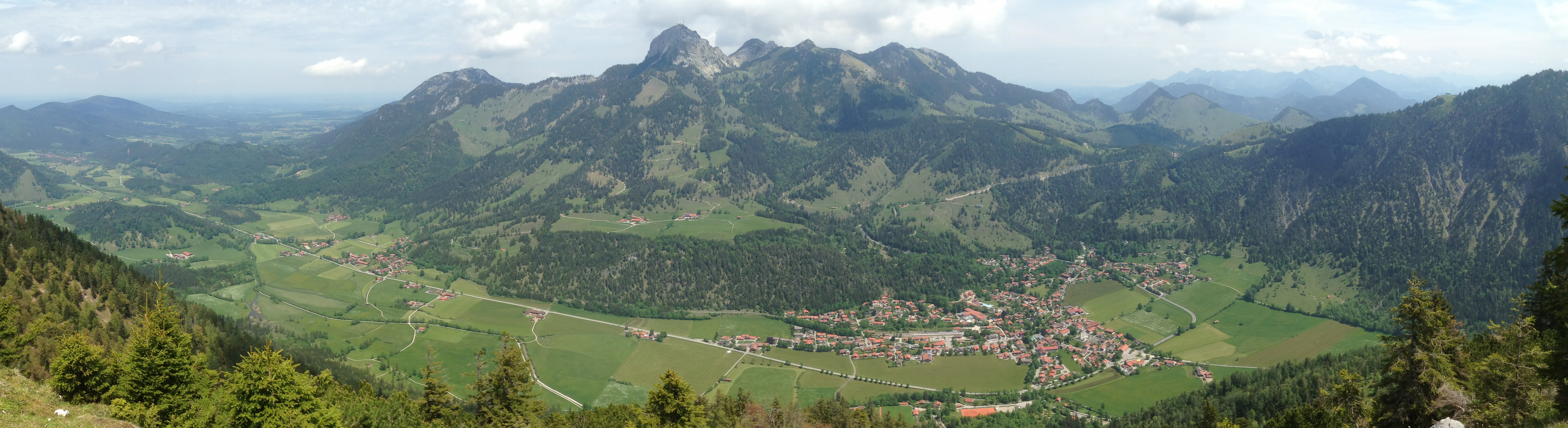 Deitsch: Bayrischzell, Wendelstein, Osterhofen, Geitau, Sudelfeld